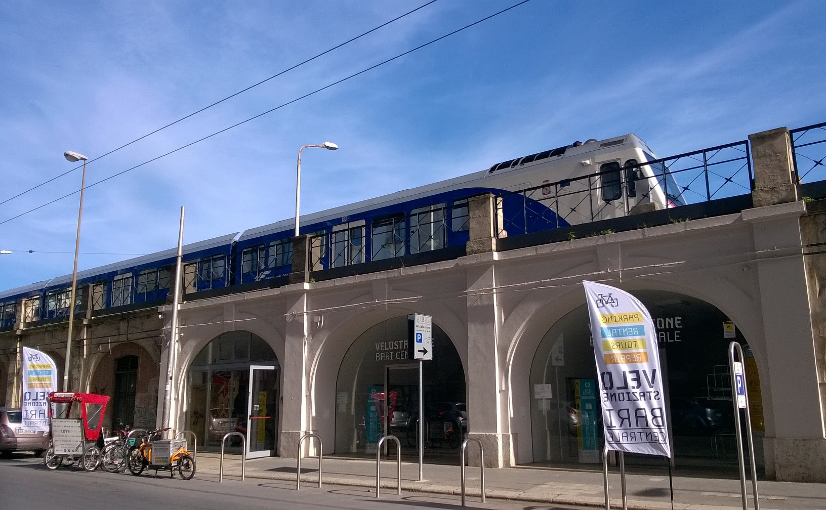 La prima del sud Italia.